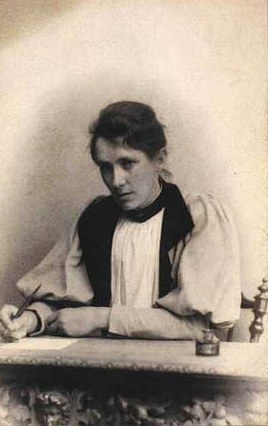 Juliane Henriette Hammer (1861-1895), Danish painter